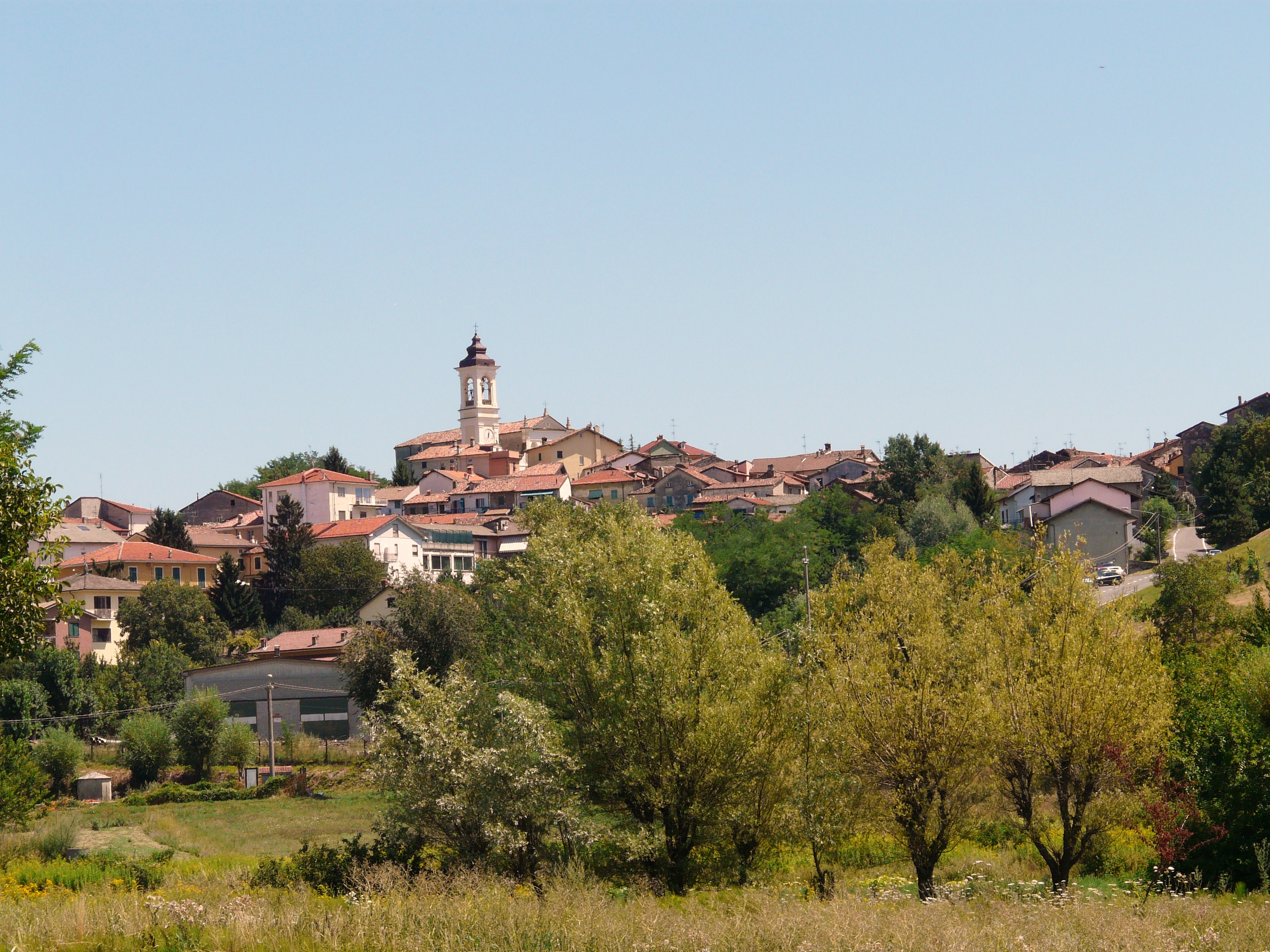 Panorama di Mornese, Piemonte, Italia